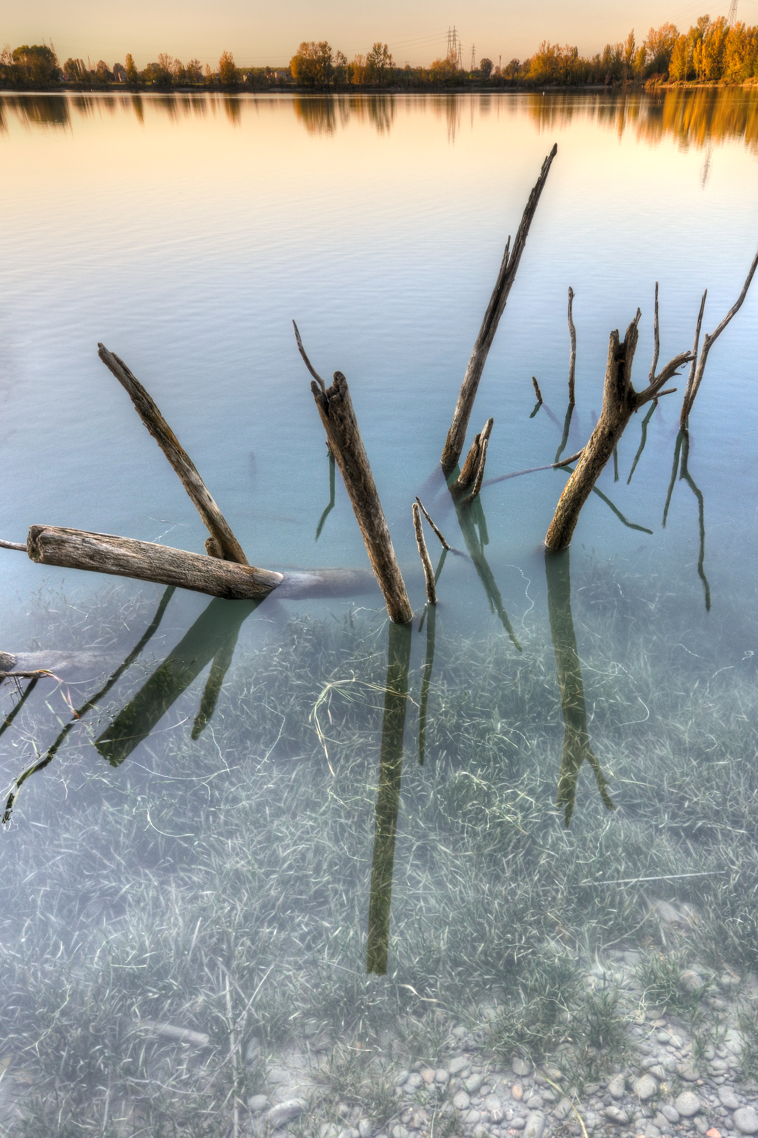 Casse di Espansione del Secchia - Campogalliano (MO) Italia - 29 Ottobre 2012